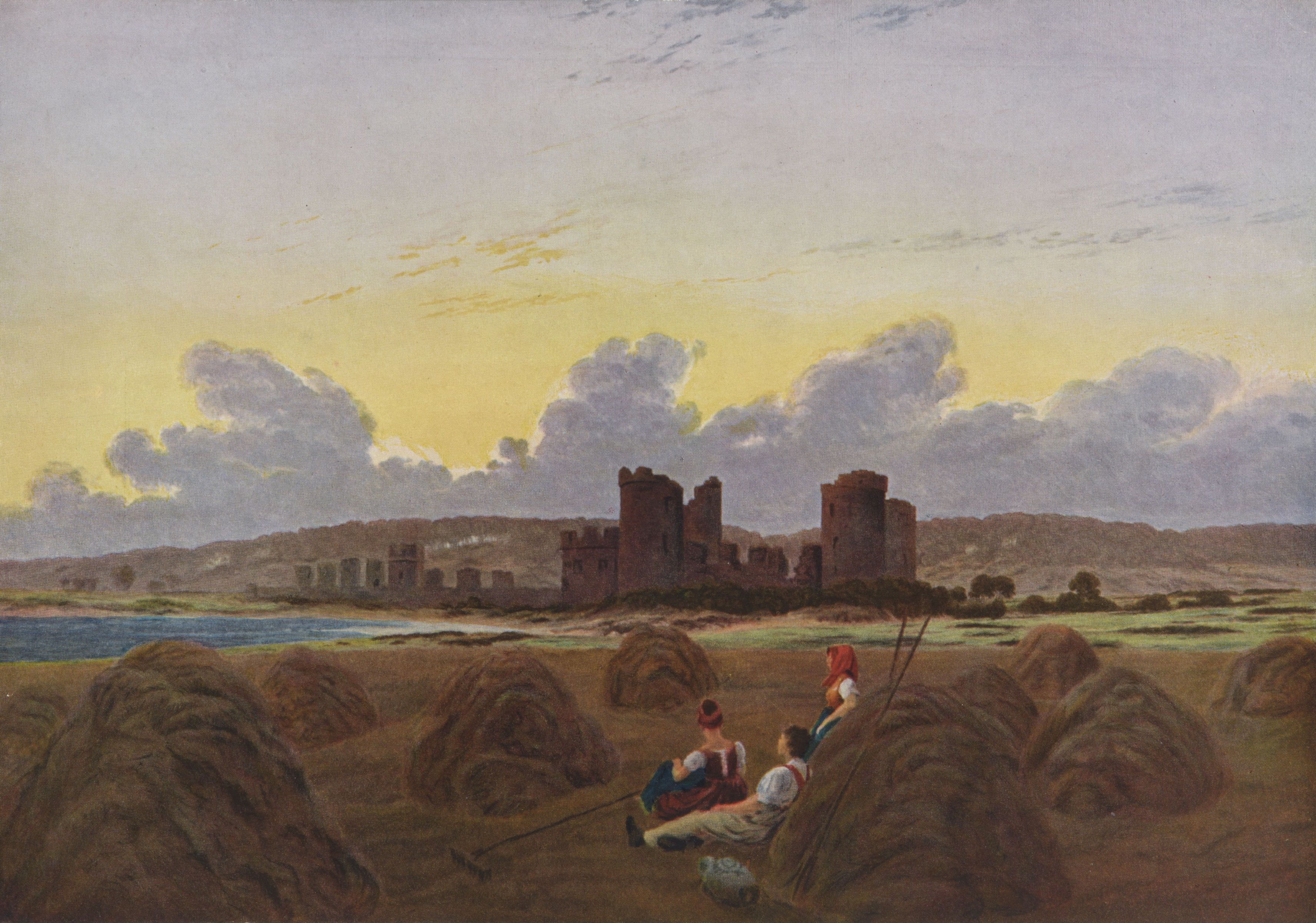 Rast bei der Heuernte, 1834, Öl auf Leinwand, 72,5 x 102 cm